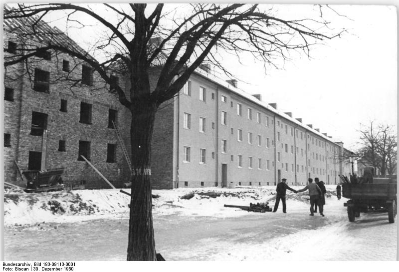 Illus-Biscan Gr.-Jst. 30.12.50 In neuen Wohnungen ins neue Jahr. Zum Jahresende wurde im Magdeburger Stadtteil Altsalbke ein großer Wohnhausblock schlüsselfertig übergeben. Die 63 schönen und modernen Wohnungen sind an Aktivisten der Maschinenfabrik Wolf-Salbke übergeben worden. UBz, Die lange Front der neuen Häuser, von denen nur noch an einem gebaut wird.